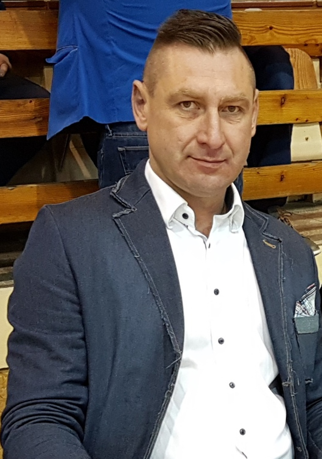 Stargard, 2017. Wiktor Grudziński